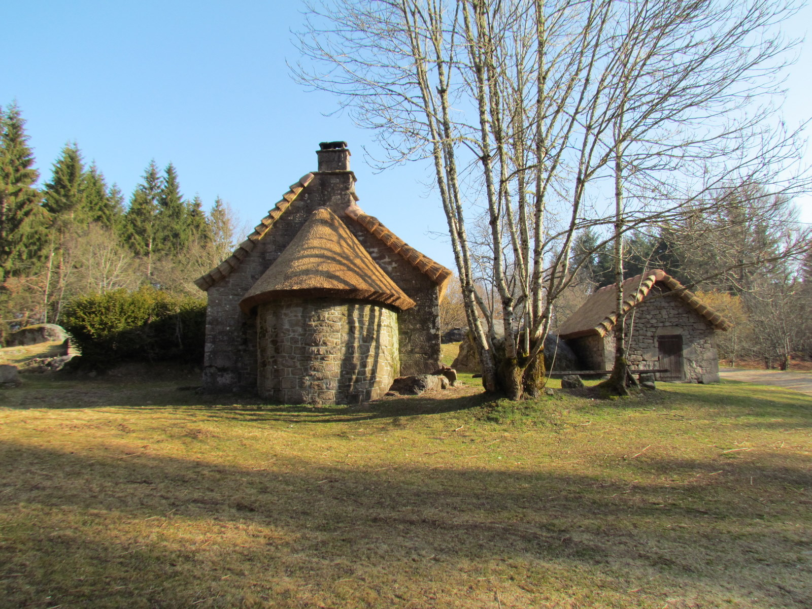 Village de Clédat (commune de Grandsaigne, Corrèze) en forêt domaniale de Larfeuil. Abandonné depuis les années 60, il est restauré progressivement par l'Association "Renaissance des vieilles pierres" . Bel exemple de rénovation d'un toit de chaume (financement Conseil général Corrèze)